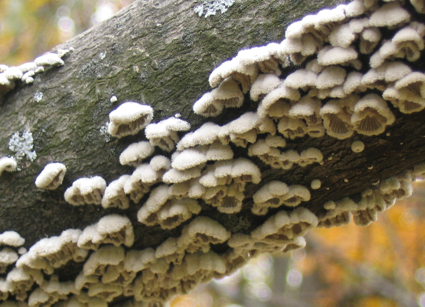 Fuzzy Fungi (Schizophyllum commune)